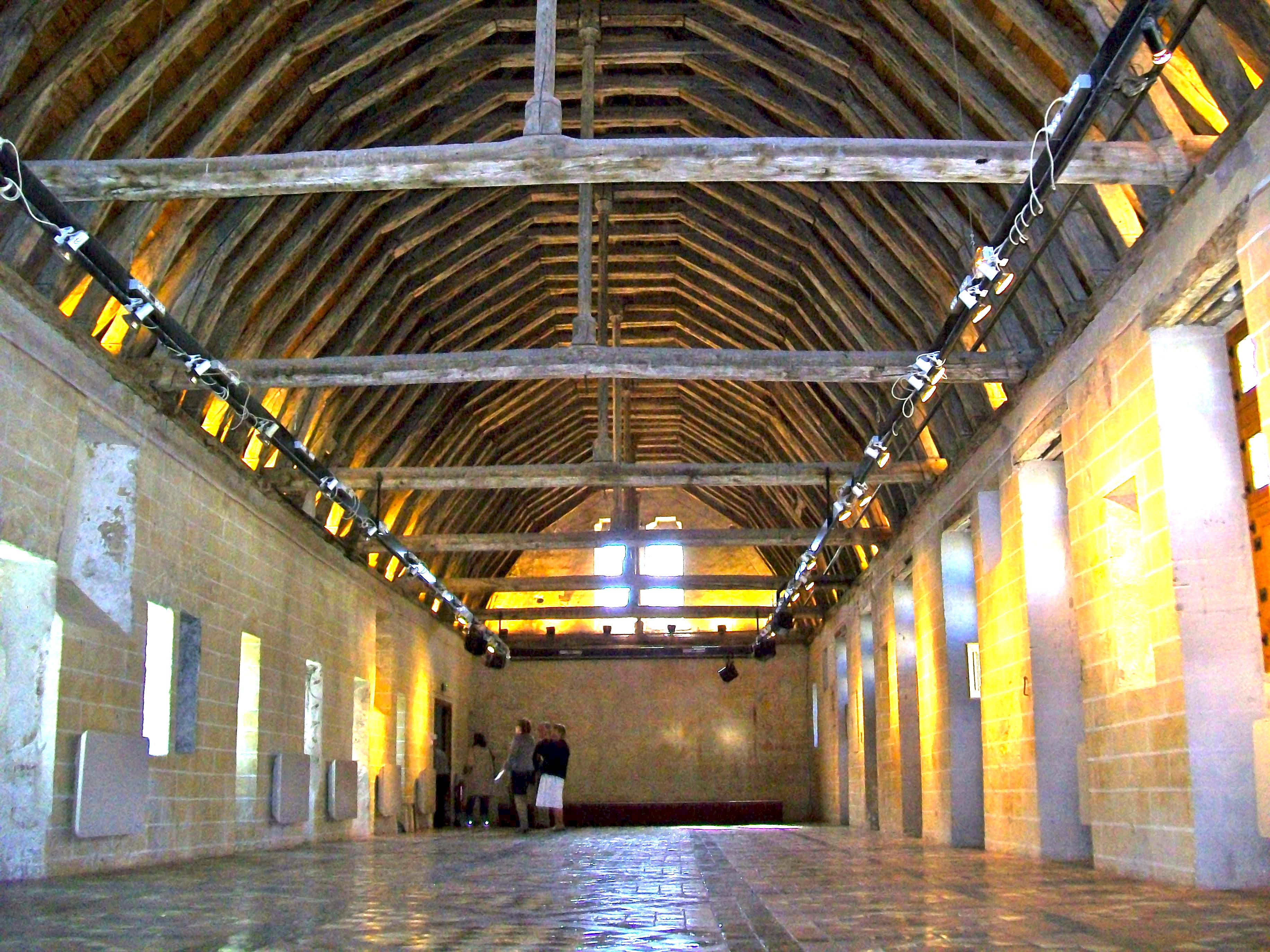 Prieuré Saint-Maurice (XIIIe siècle), dortoir des moines. La charpente daterait du début du XVIe siècle, et le dallage est également très ancien.